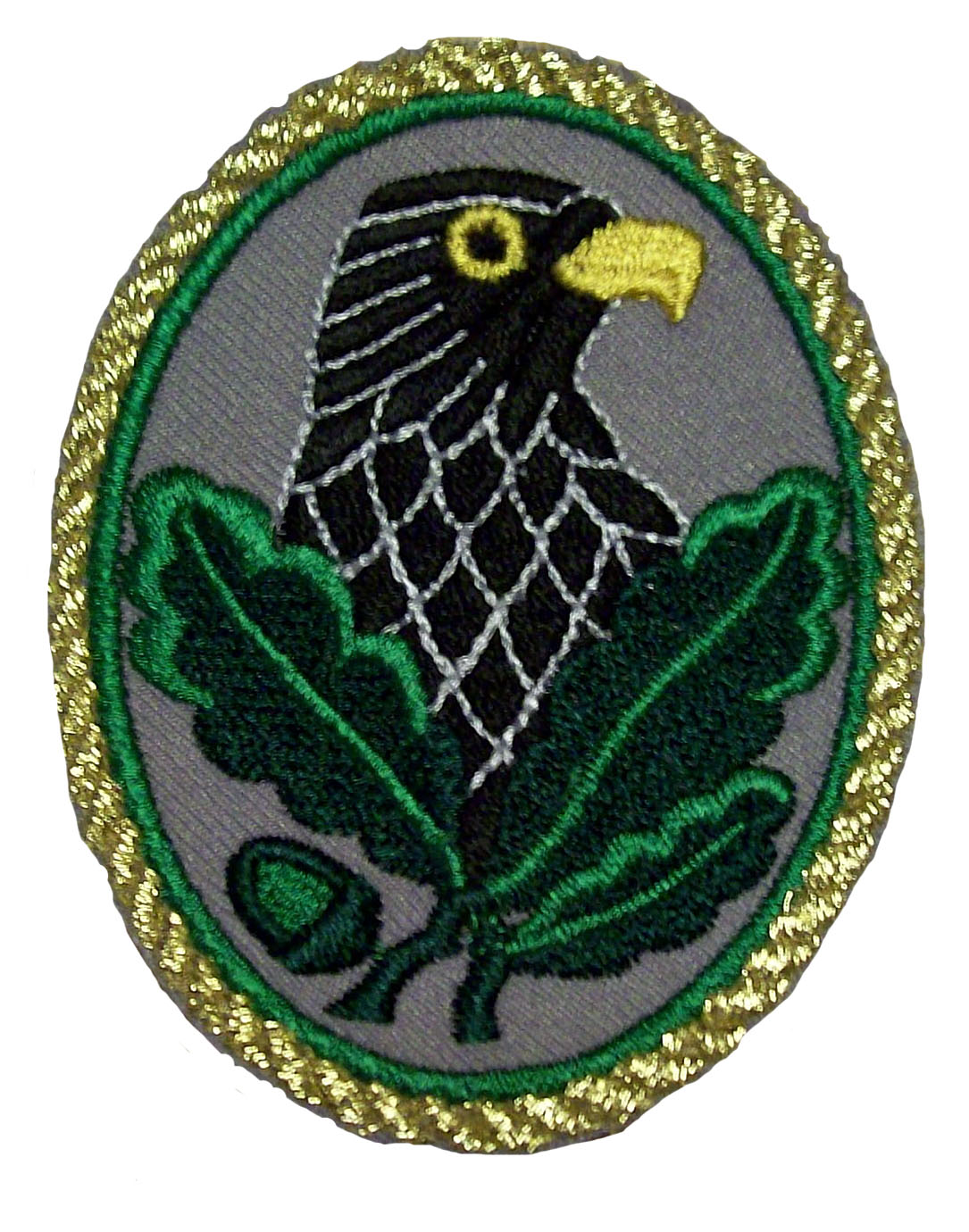 Scharfschützenabzeichen 3. Stufe (Gold)